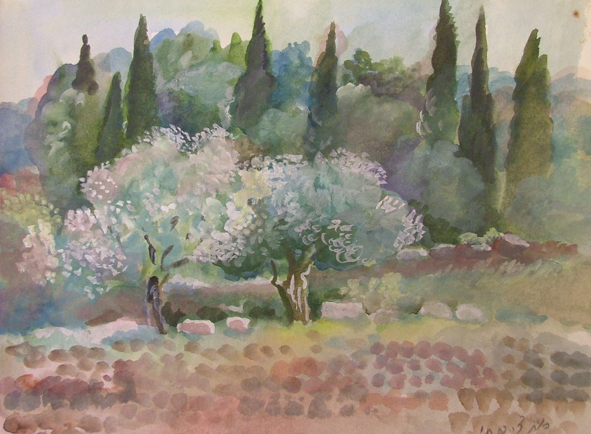 נוף ברושים - צבעי מים